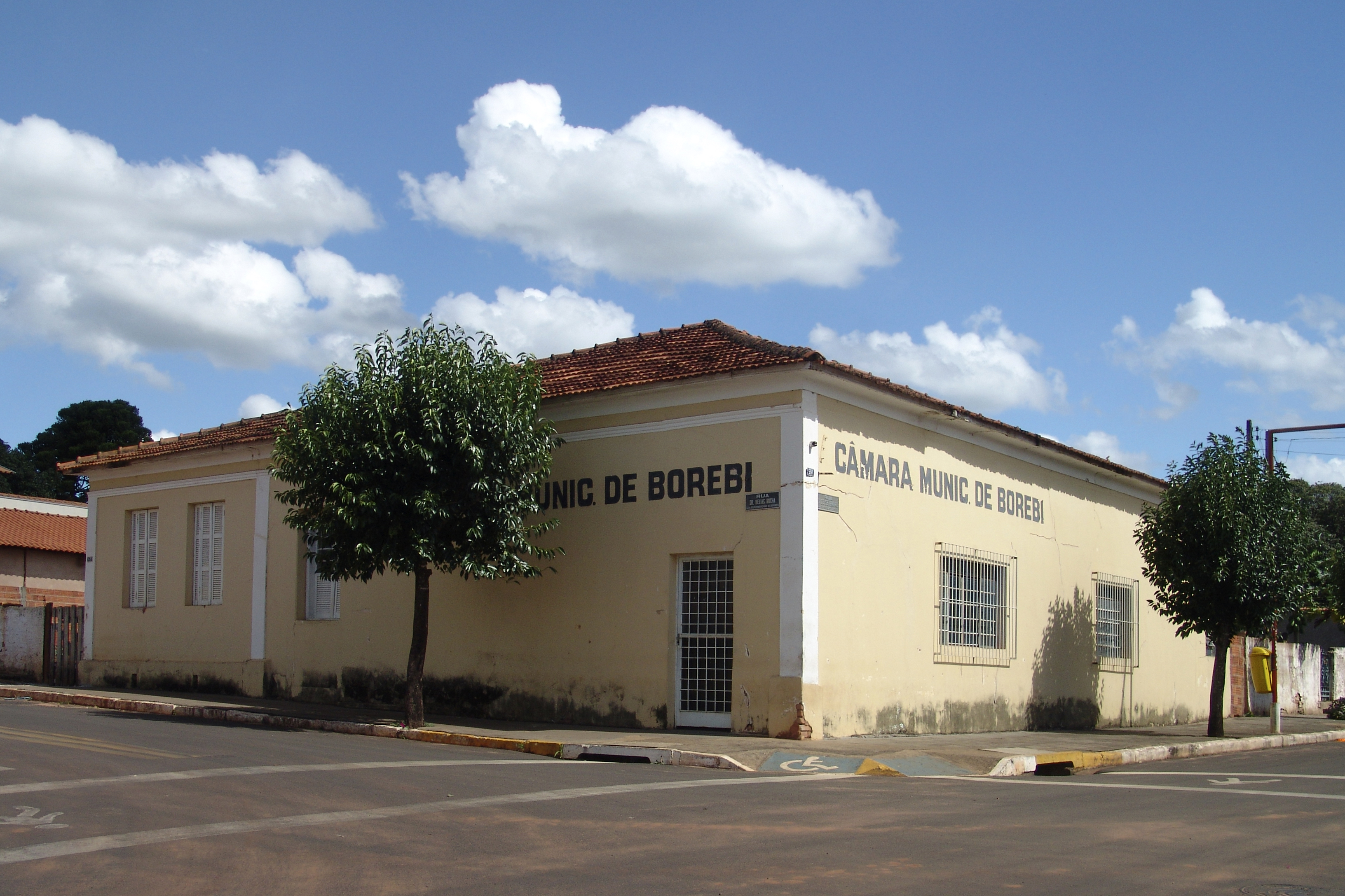 Câmara municipal de Borebi, município de São Paulo, Brasil